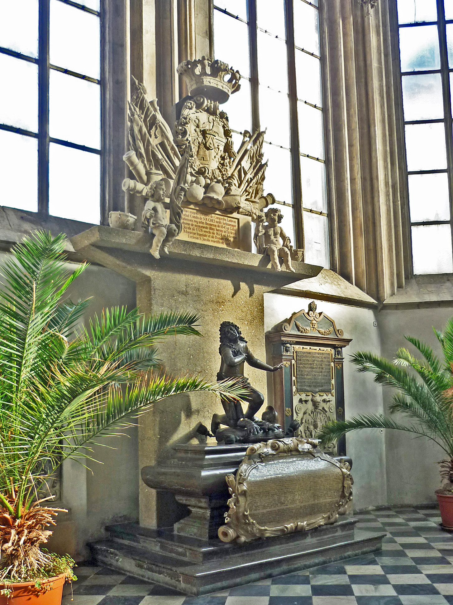 Grabmal des kaiserlichen Feldherrn Graf Jean-Louis Raduit de Souches in der St. Jakobskirche in Brünn (Brno)